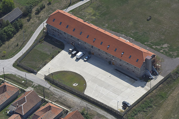 Szihalom, légi fotó